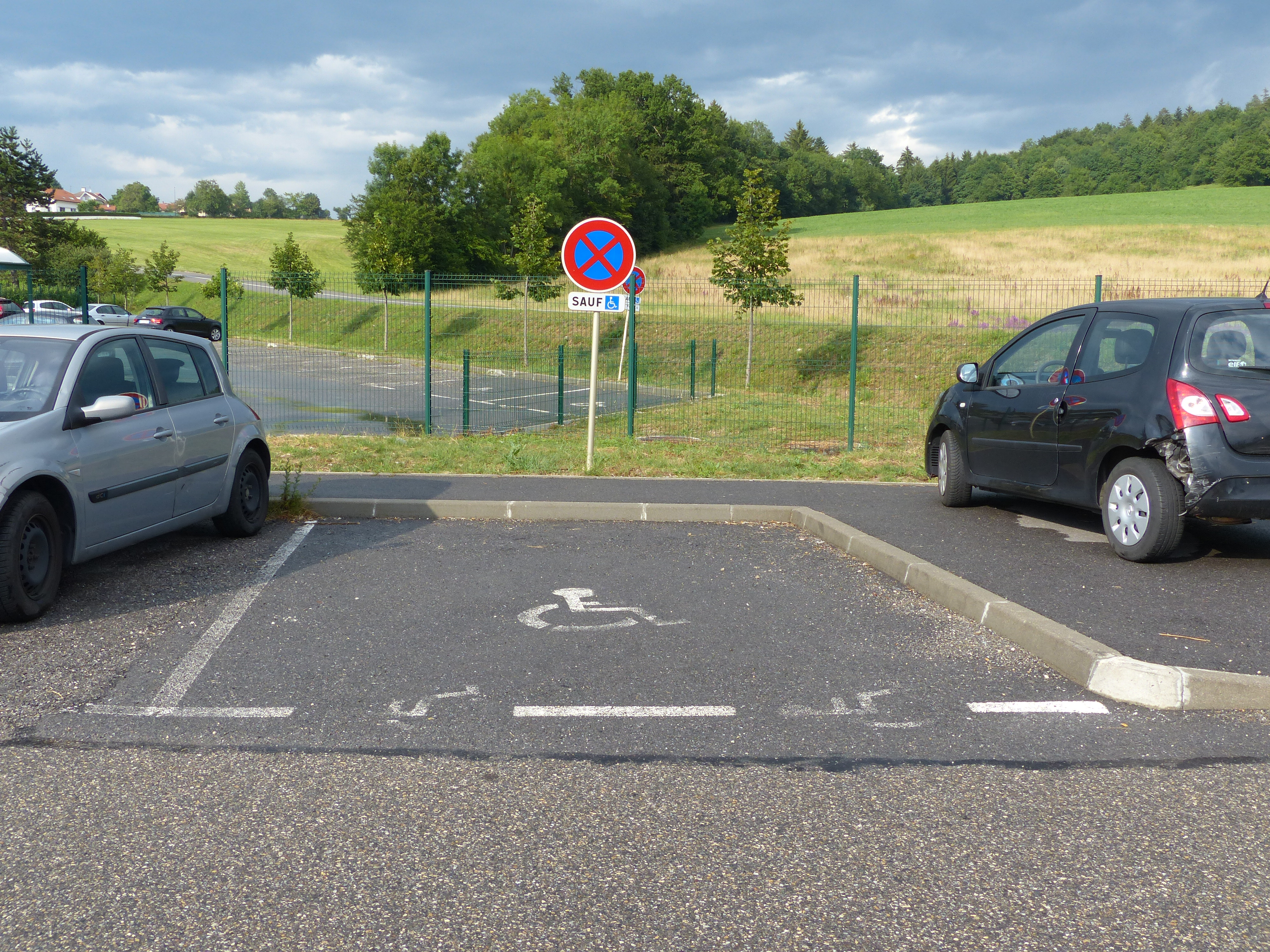 Panneau B6h avec panonceau M6h et emplacement de parking avec pictogramme sur la chaussée, Saint-Martin-Bellevue, Haute-Savoie, France.